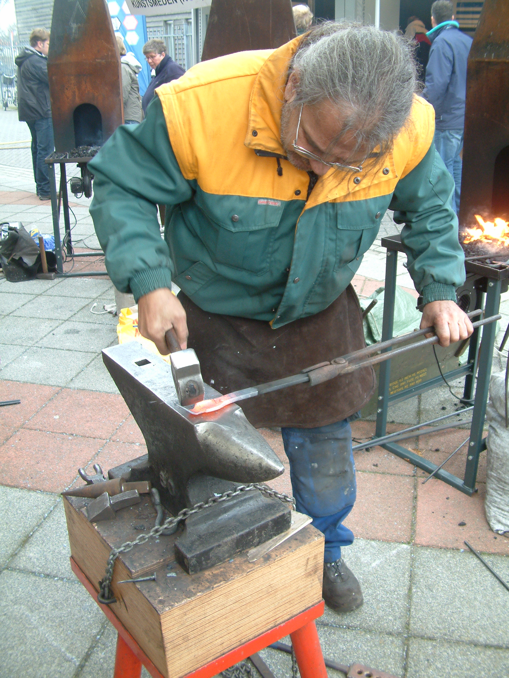 Smeden op de klassieke schepen beurs.